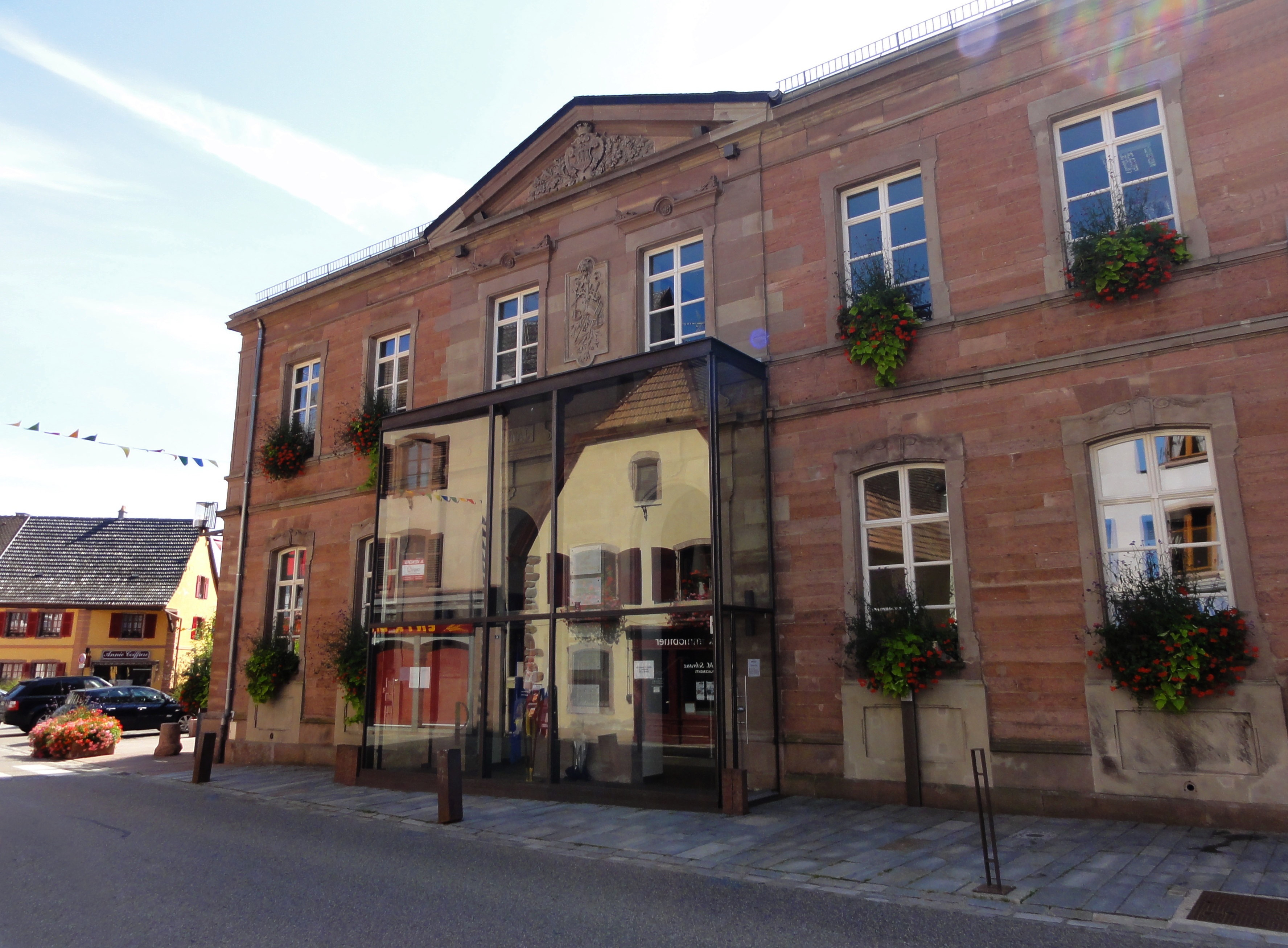 Alsace, Bas-Rhin, Villé, Mairie (1878), 21 place du Marché. .